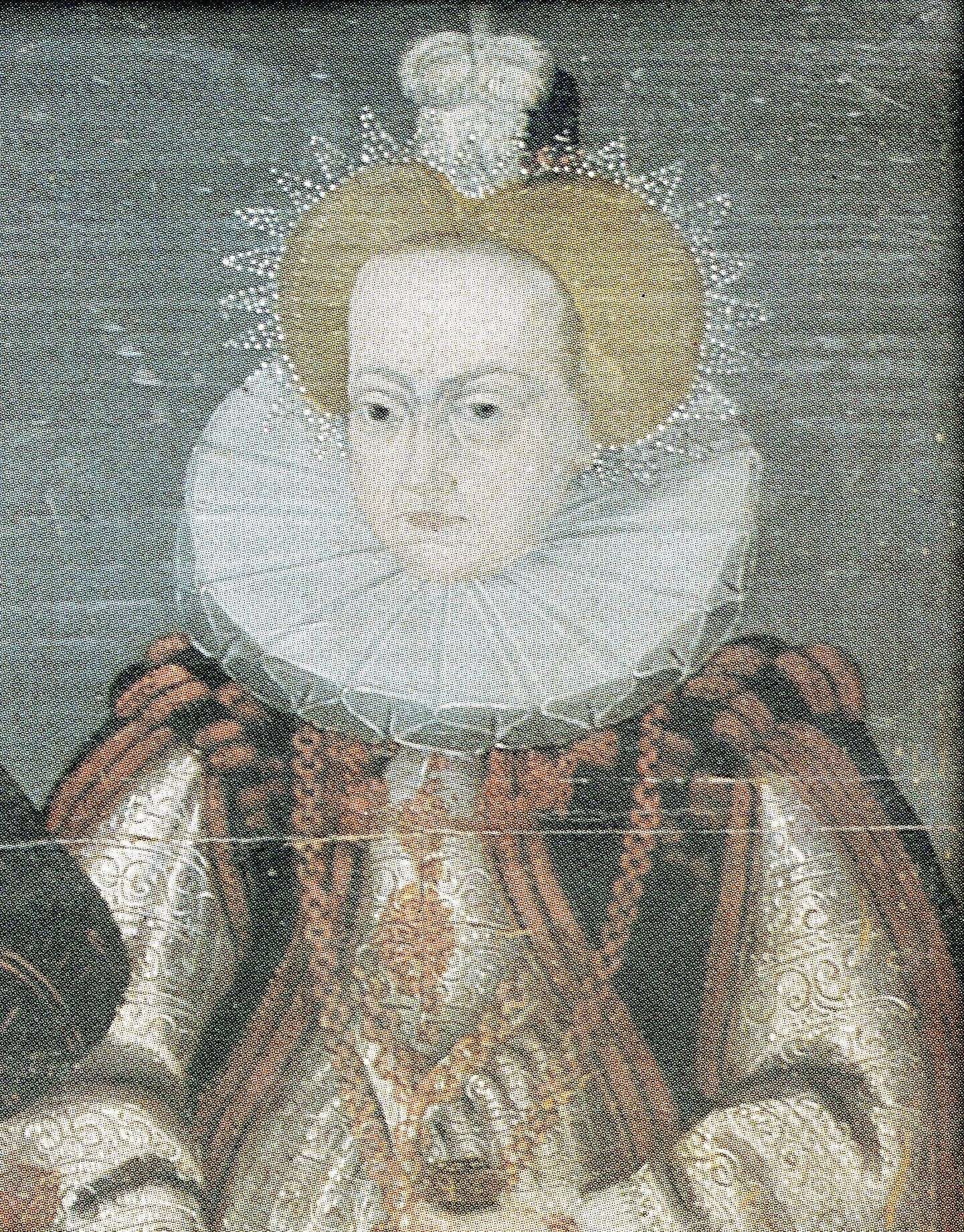 Ölgemälde von Herzog Bogislaw XIV. von Pommern und seiner Gemahlin Elisabeth von Schleswig-Holstein-Sonderburg.